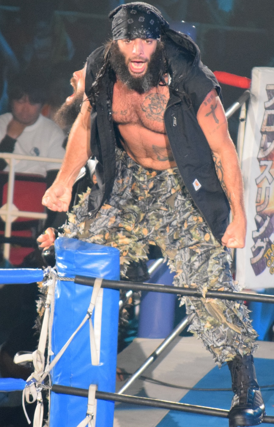 2016年6月19日 大阪城ホール 「DOMINION 6.19 in OSAKA-JO HALL」 マーク・ブリスコ